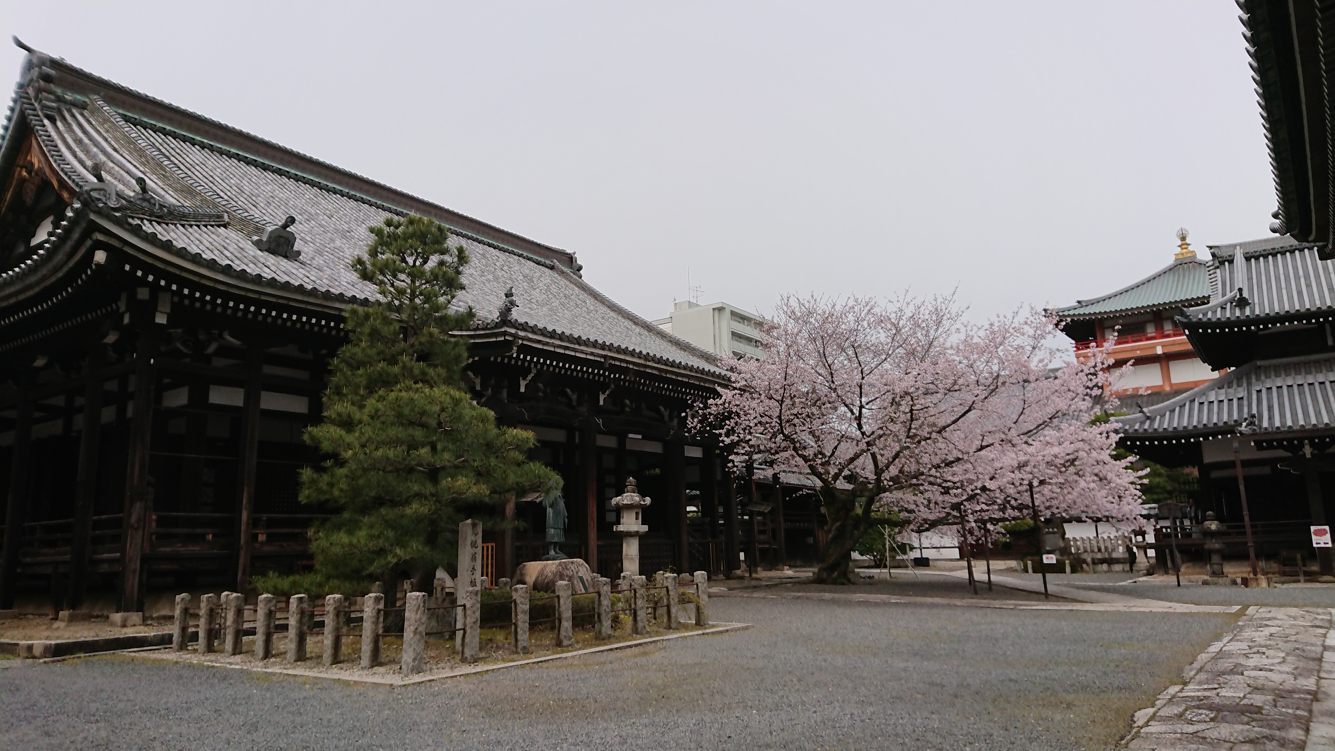 本法寺(京都市）境内